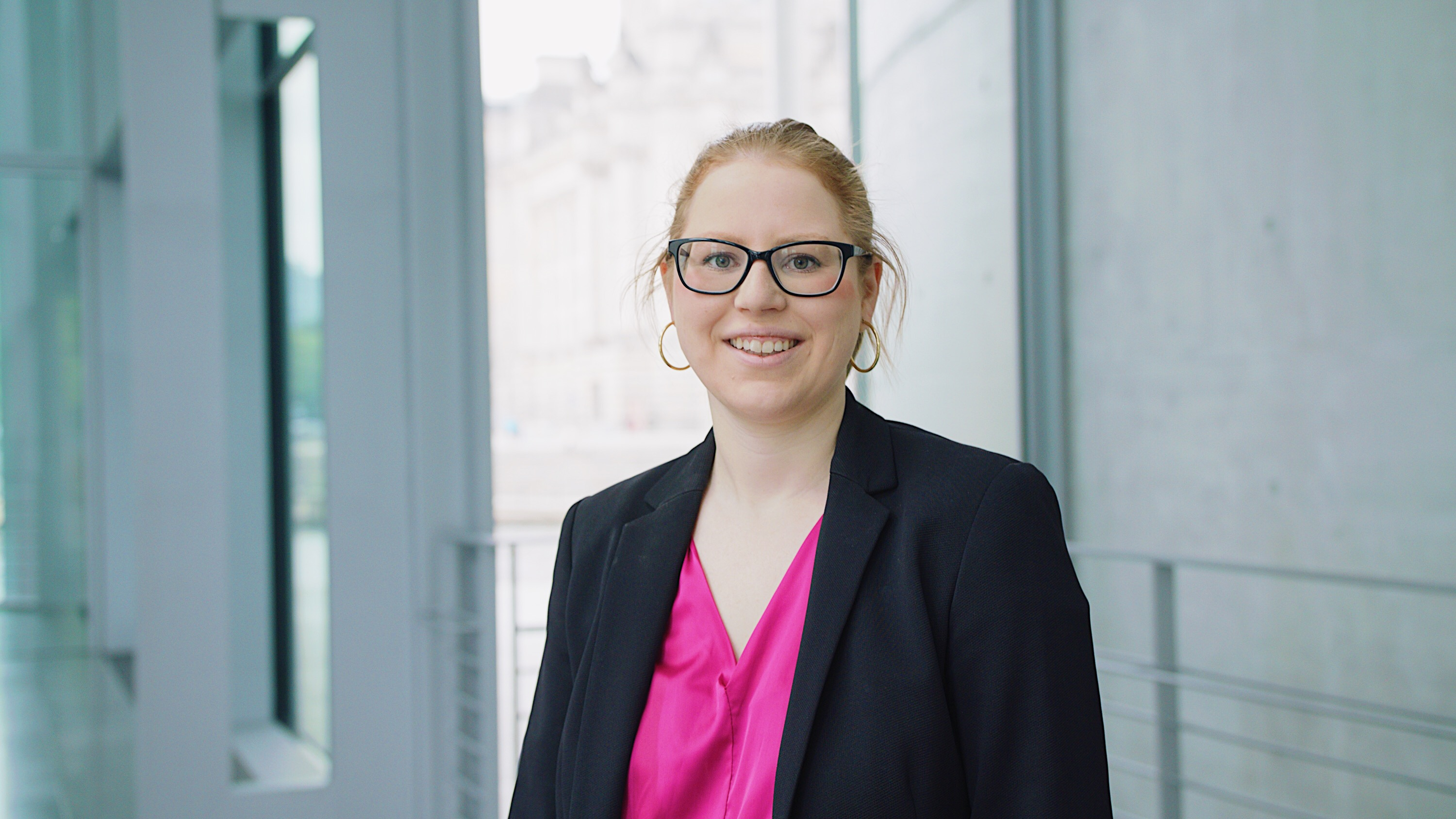 Pressefoto von Katrin Helling-Plahr MdB.